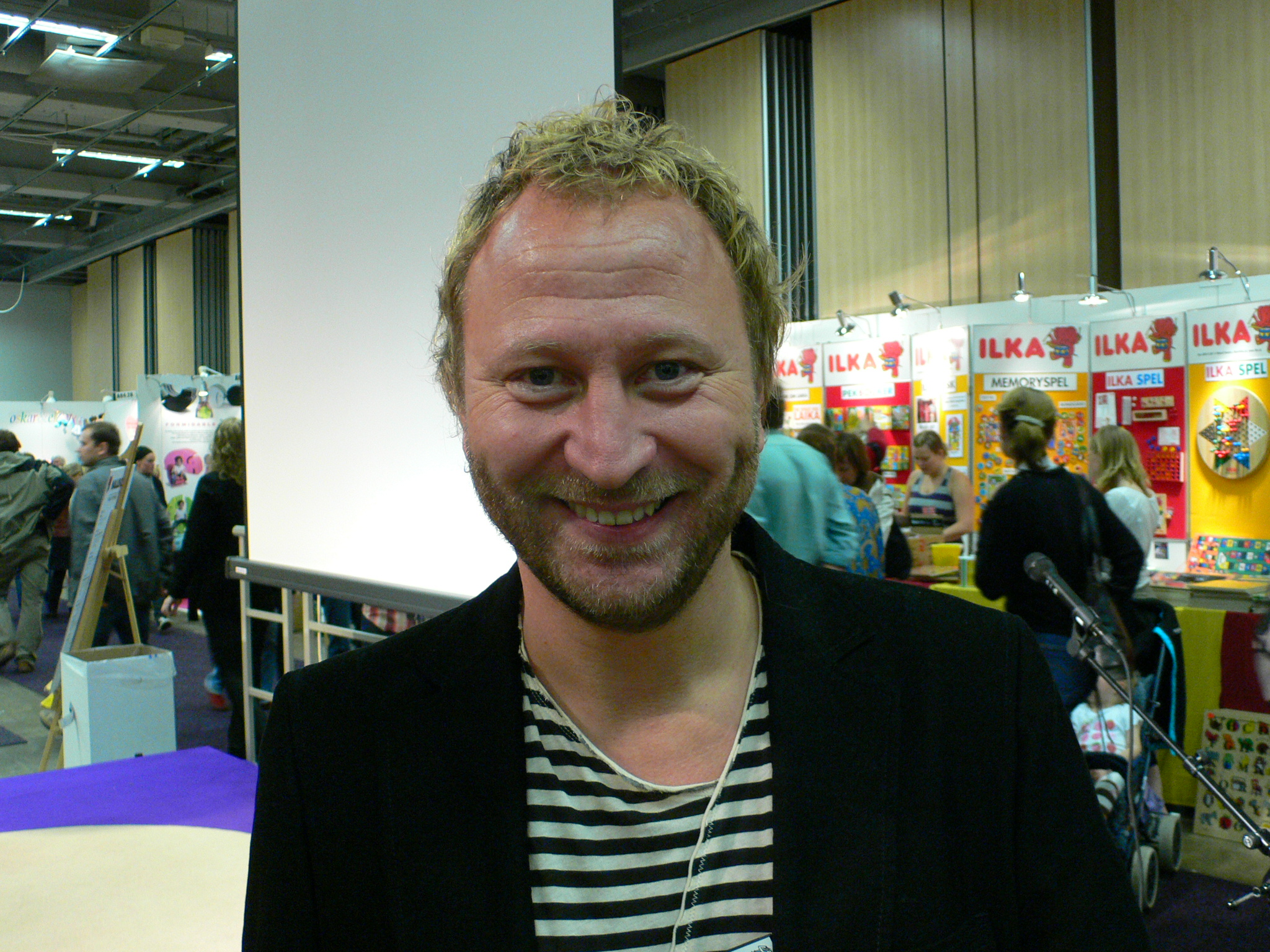 Sören Olsson on Gothenburg Book Fair 2007, Sören Olsson på Bok- och biblioteksmässan 2007